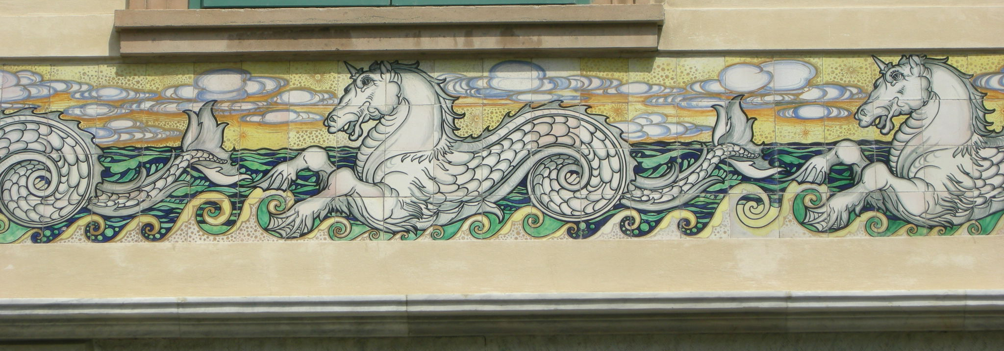 Villino Tolomei, fregio, dettaglio